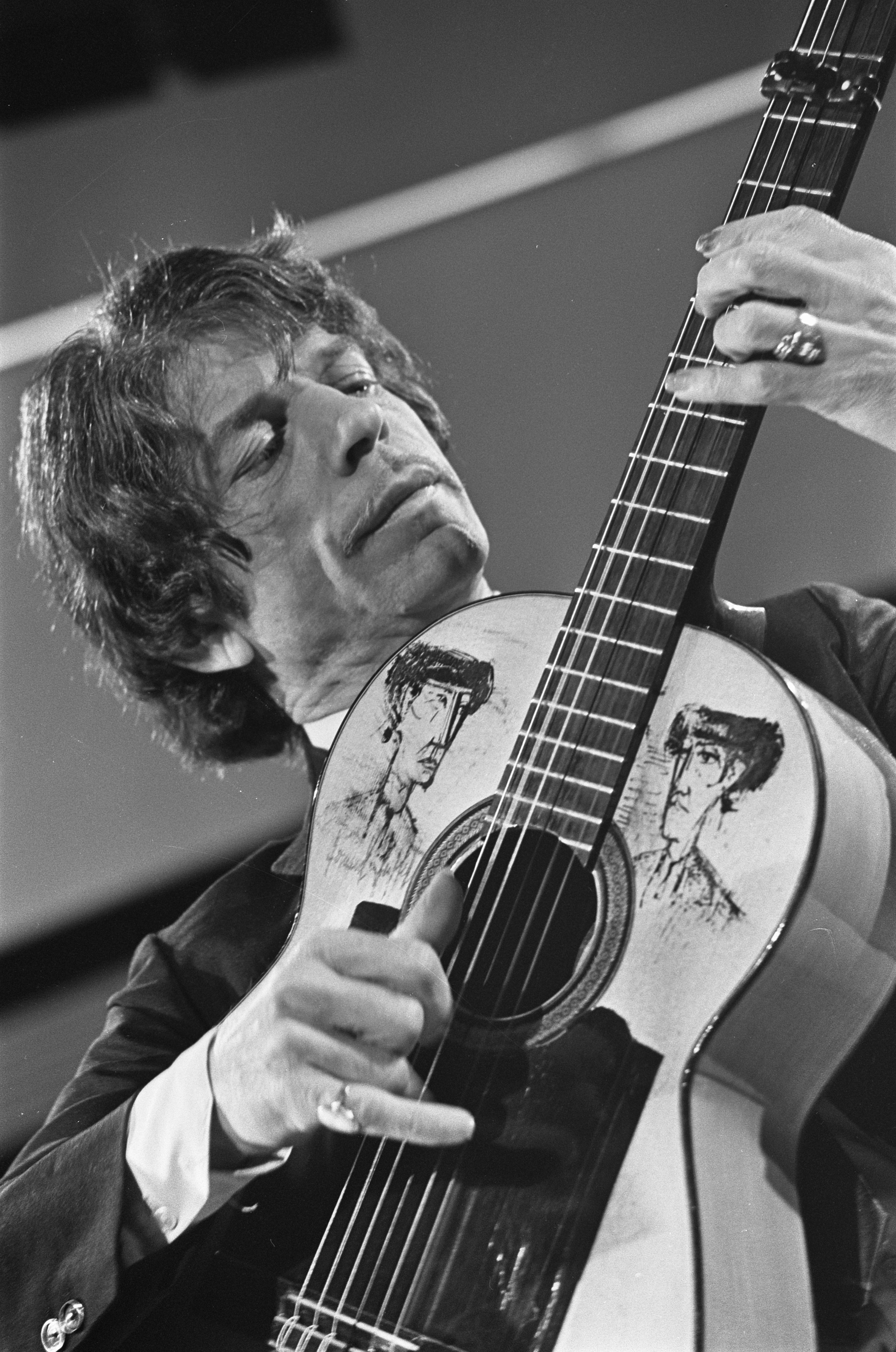 Collectie / Archief : Fotocollectie Anefo Reportage / Serie : Grand Gala du Disque 1968 Beschrijving : Grand Gala du Disque in de RAI. Gitarist Manitas de Platas uit Spanje Datum : 7 maart 1968 Locatie : Amsterdam Trefwoorden : gitaristen Instellingsnaam : RAI Fotograaf : Nijs, Jac. de / Anefo Auteursrechthebbende : Nationaal Archief Materiaalsoort : Negatief (zwart/wit) Nummer archiefinventaris : bekijk toegang 2.24.01.05 Bestanddeelnummer : 921-1450